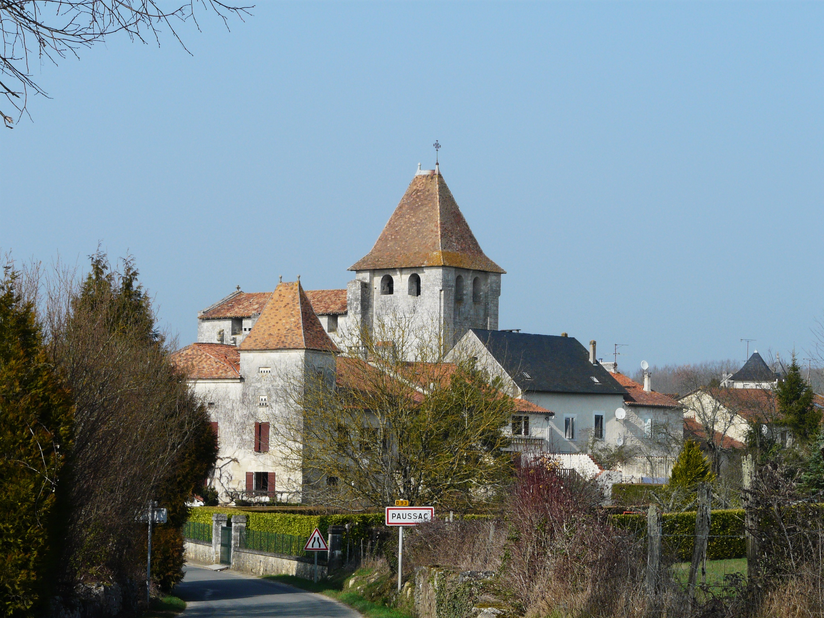 Le village de Paussac et son église, Paussac-et-Saint-Vivien, Dordogne, France.